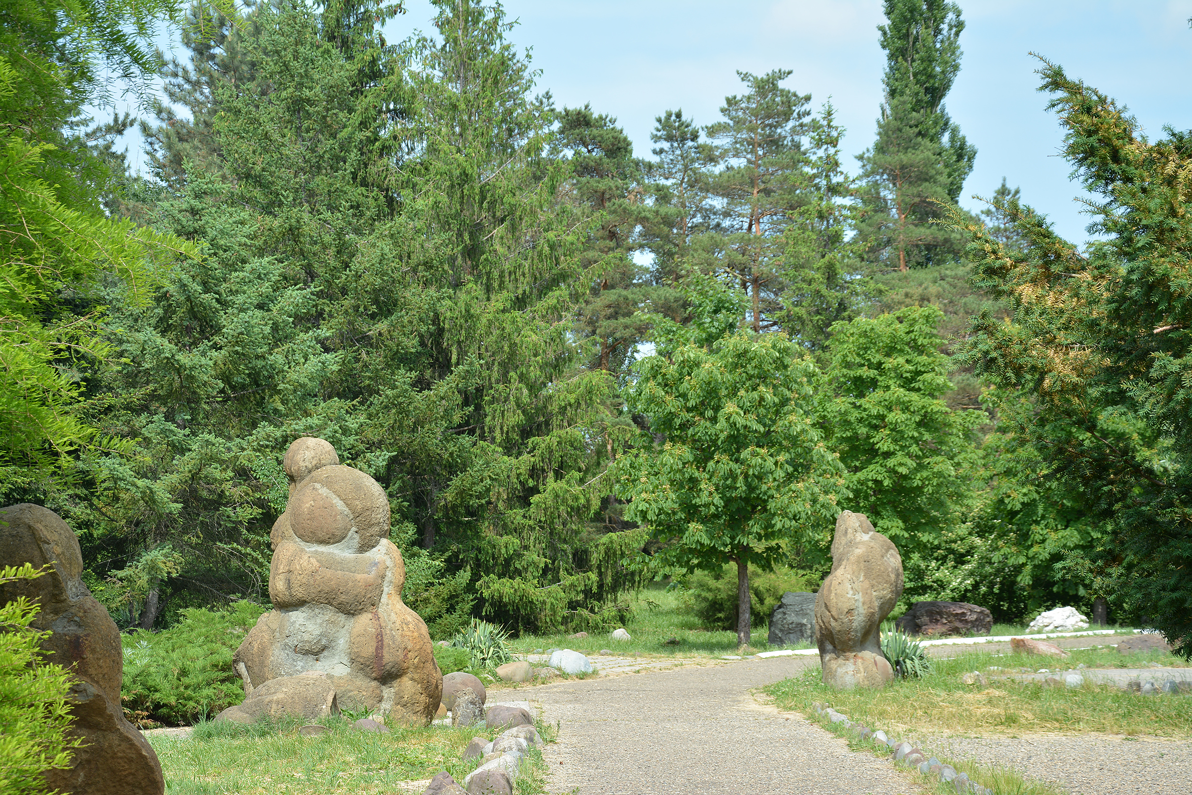 Гончарский дендрологический парк им. П.В. Букреева, Гиагинский район This image is related to the protected area of Russia number 0120003